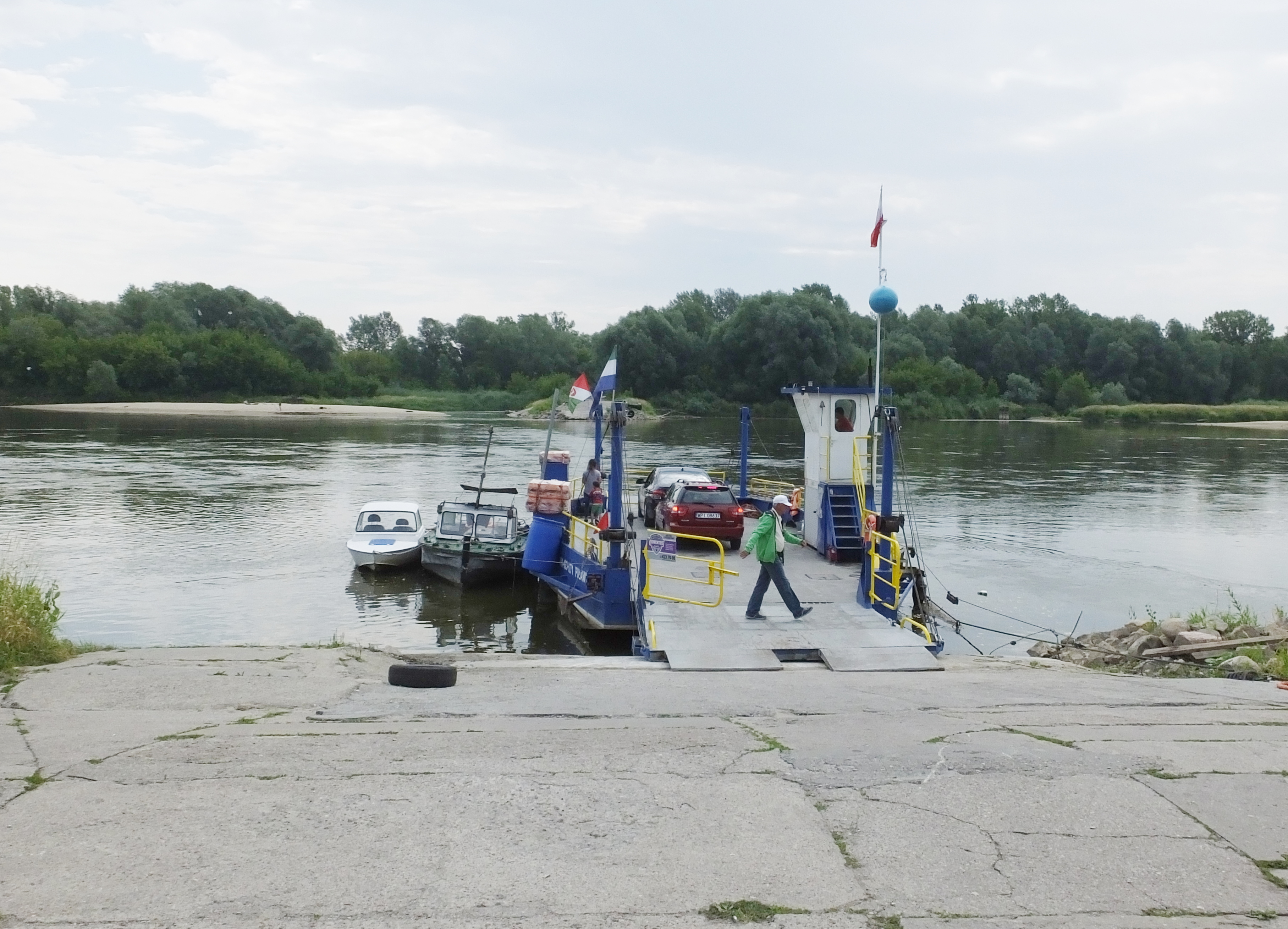 Prom między Karczewem a Gassami